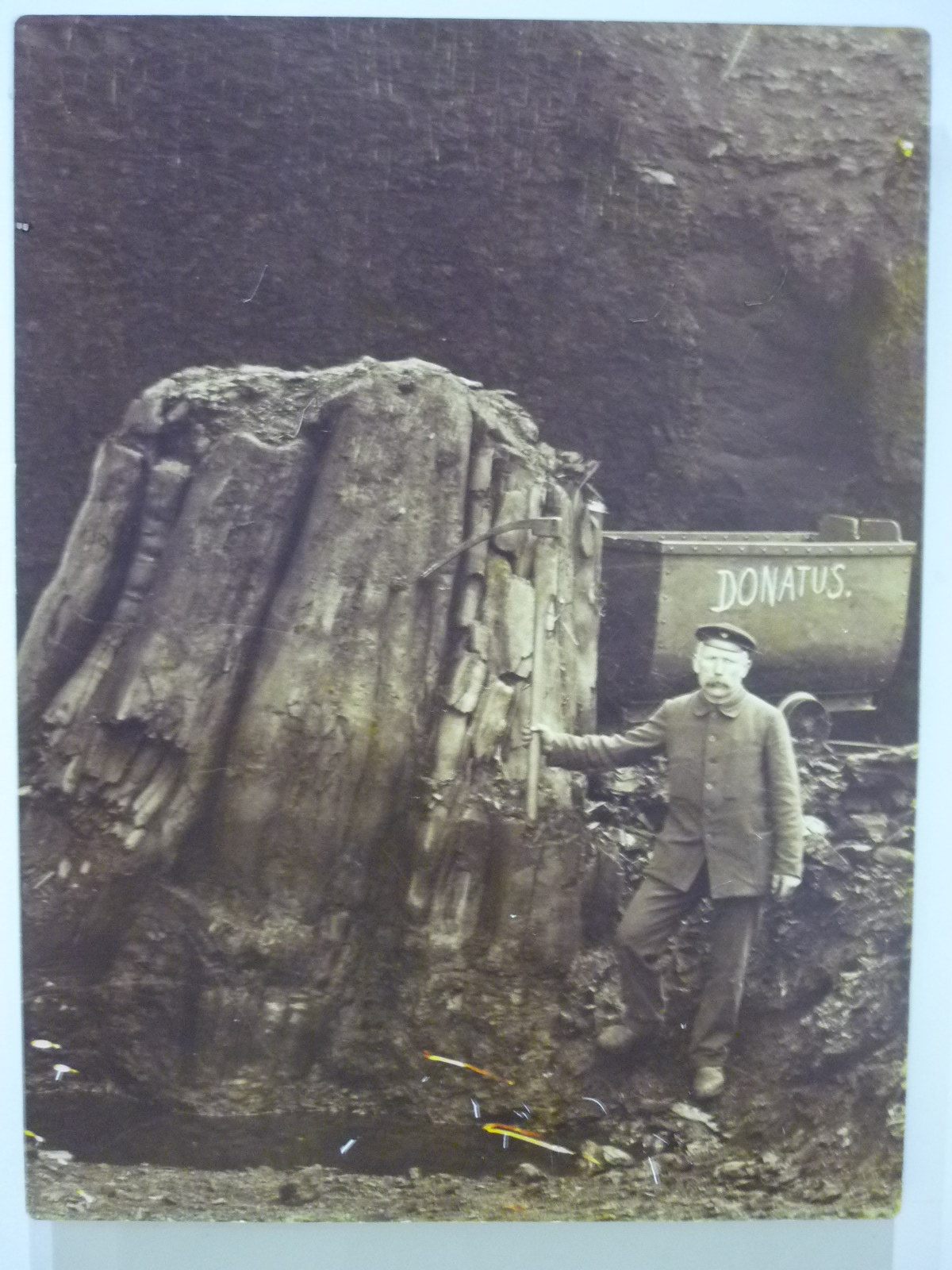 Fossiler Baumstumpf in einem Braunkohlenflöz in der Grube Donatus, um 1900